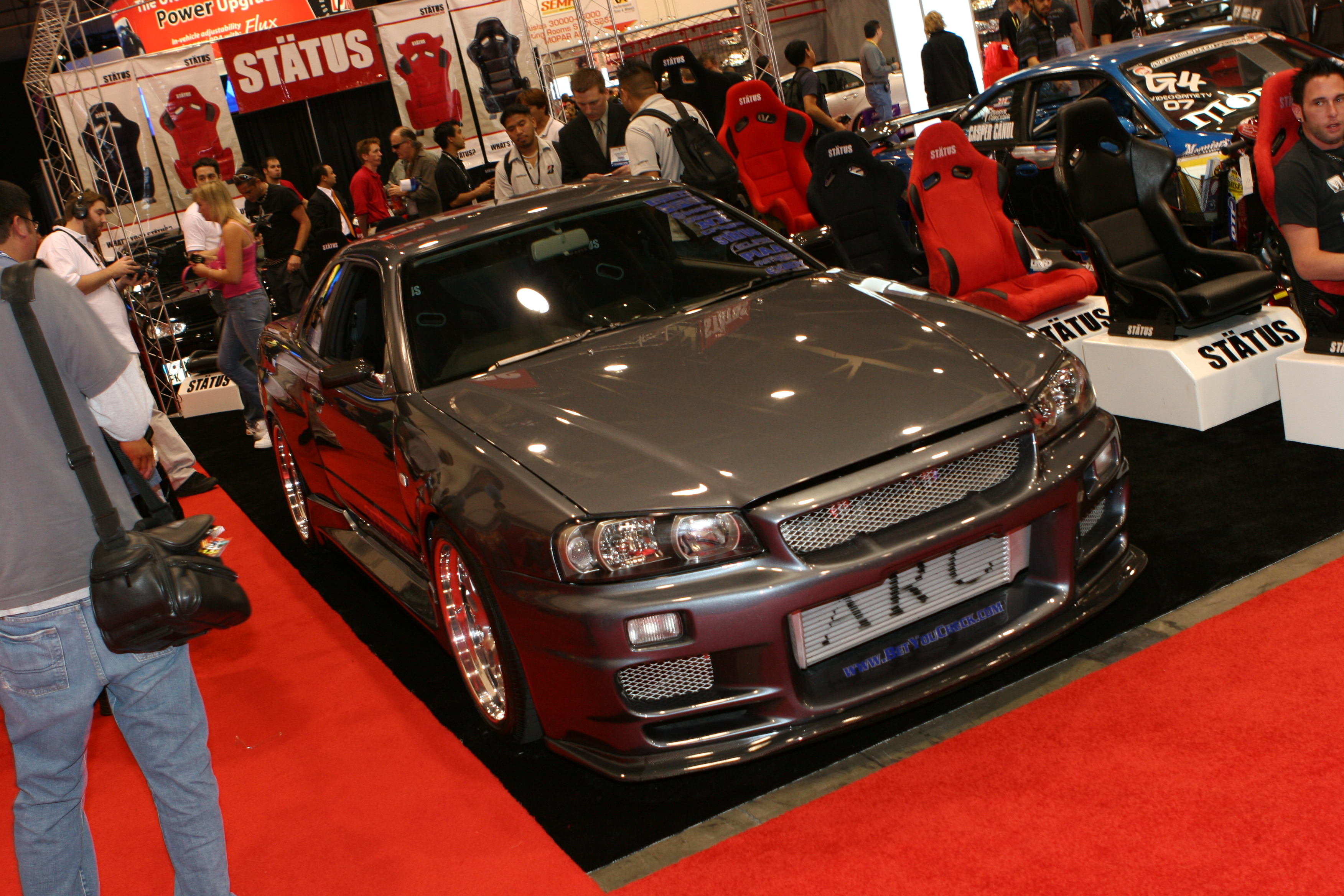 Nissan Skyline GT-R34